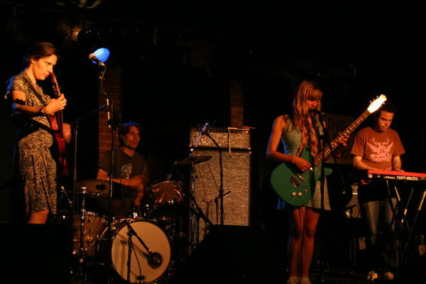 Monade live